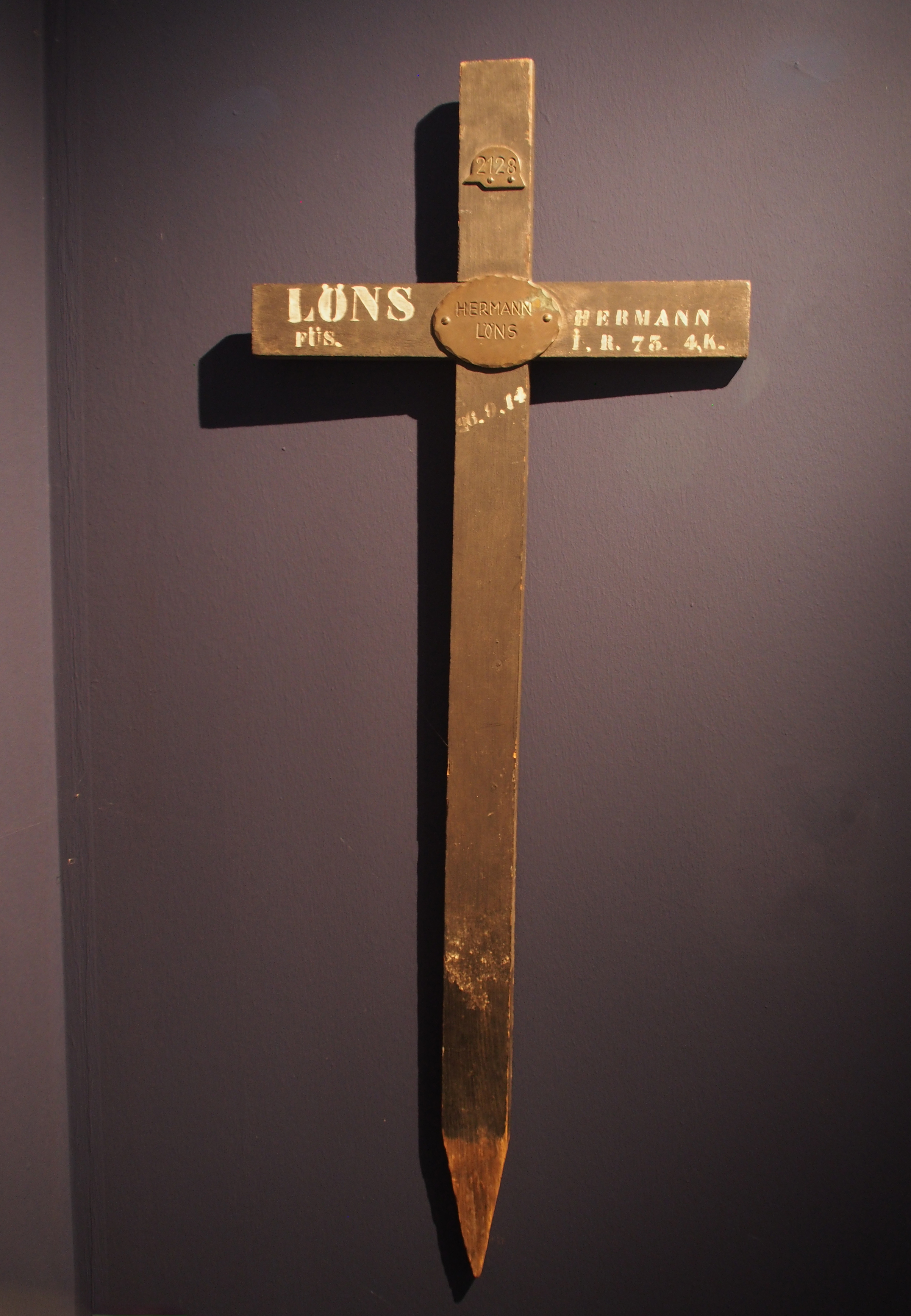 Grabkreuz von Hermann Löns, ursprünglich auf dem Soldatenfriedhof in Loivre aufgestellt, 2014 im Historischen Museum in Hannover